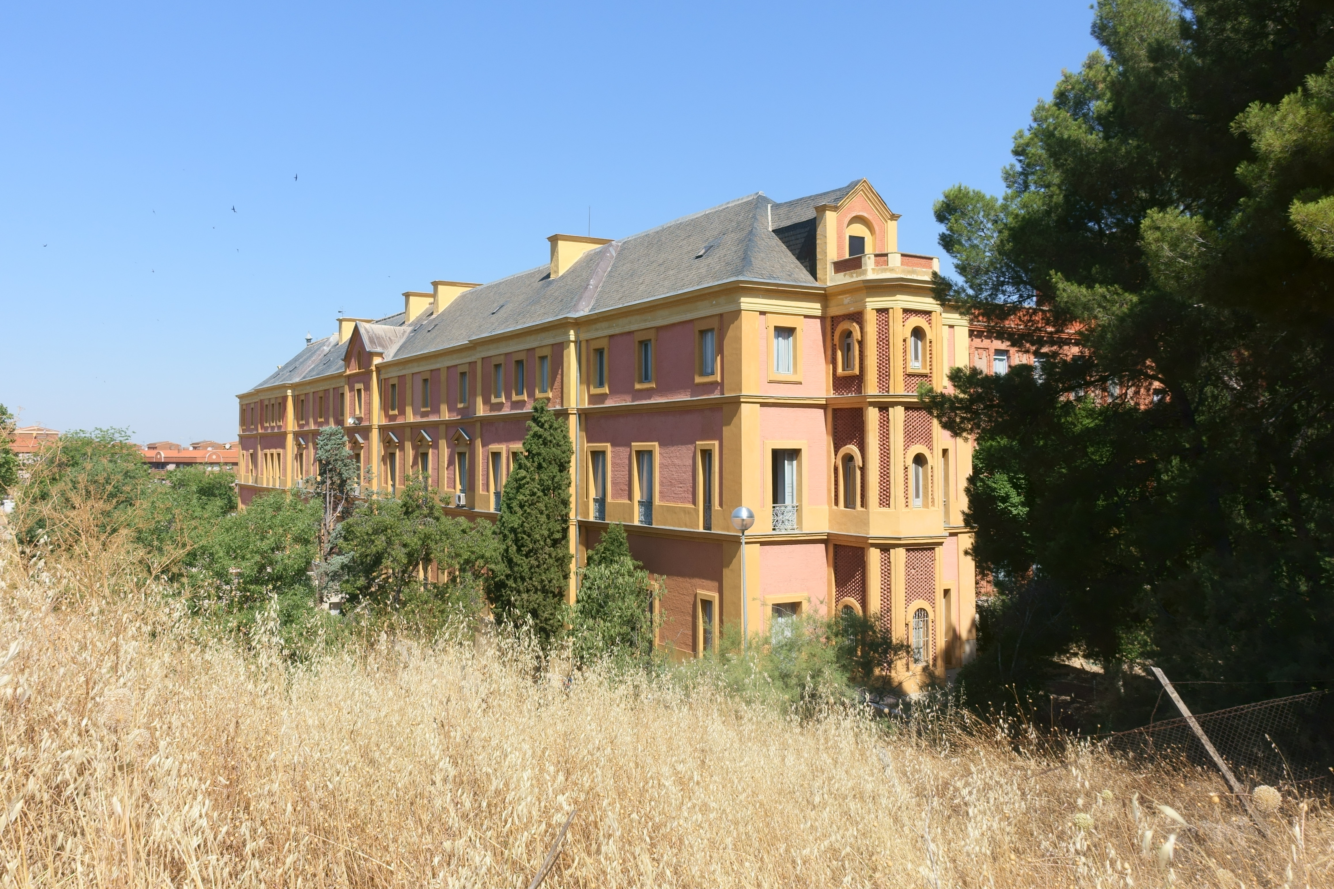 Palacio del Deleite o de María Cristina, en Aranjuez (Madrid, España).